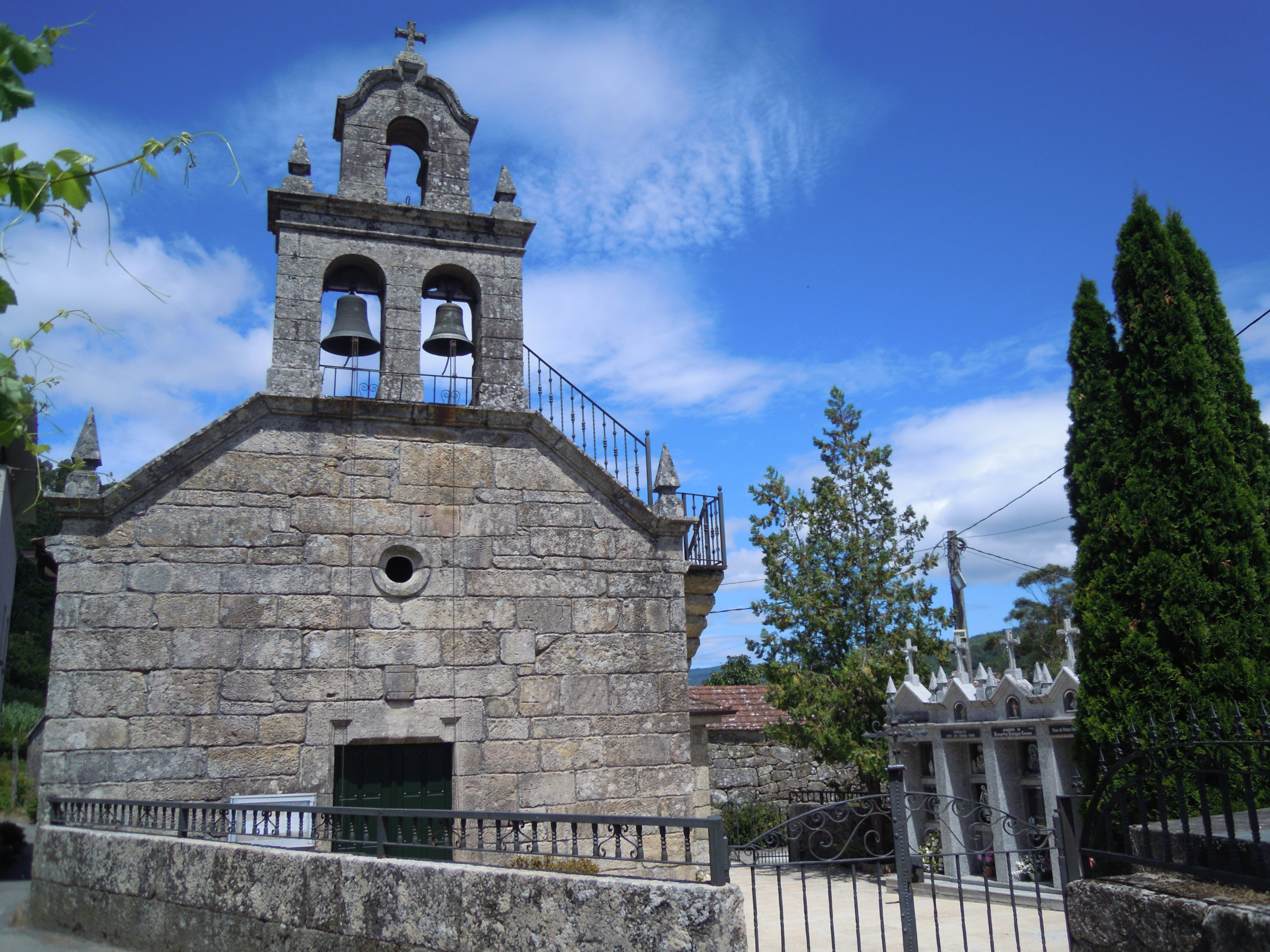 Igrexa da Santa Cruz de Sendelle (Crecente)